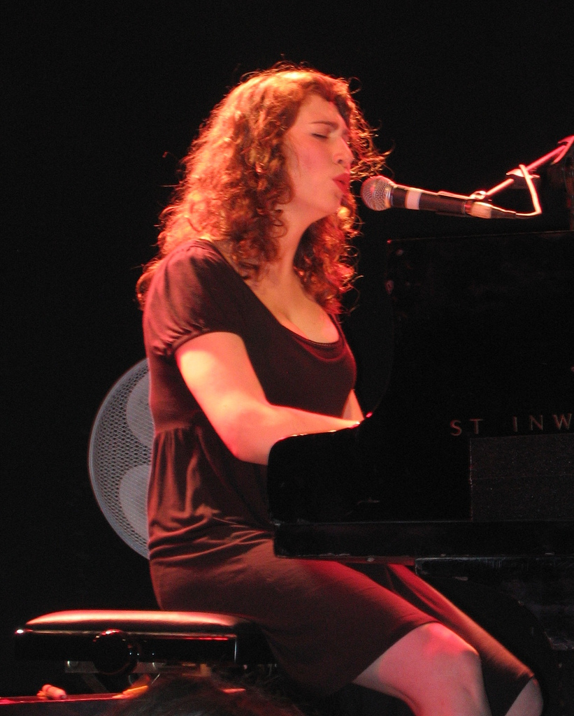 Regina Spektor in concert, Tel Aviv, Israel